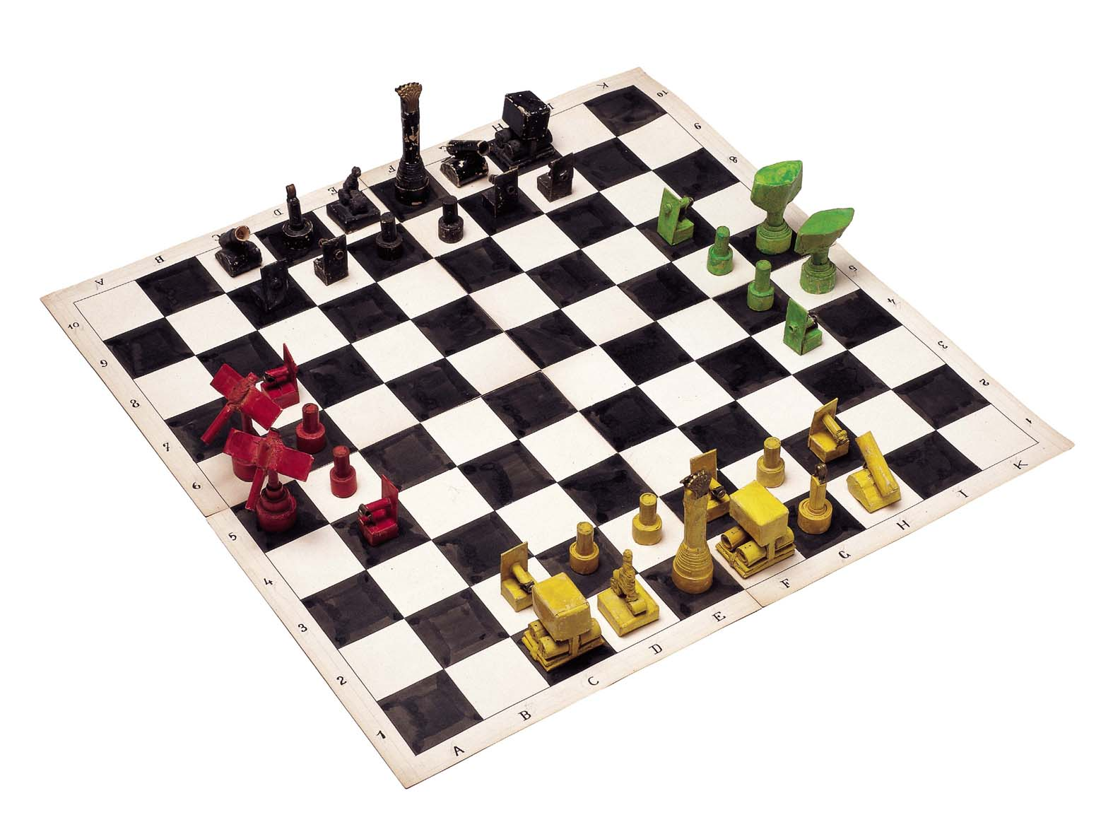 Koalitionsschach, konzipiert und umgesetzt von Arnold Schönberg